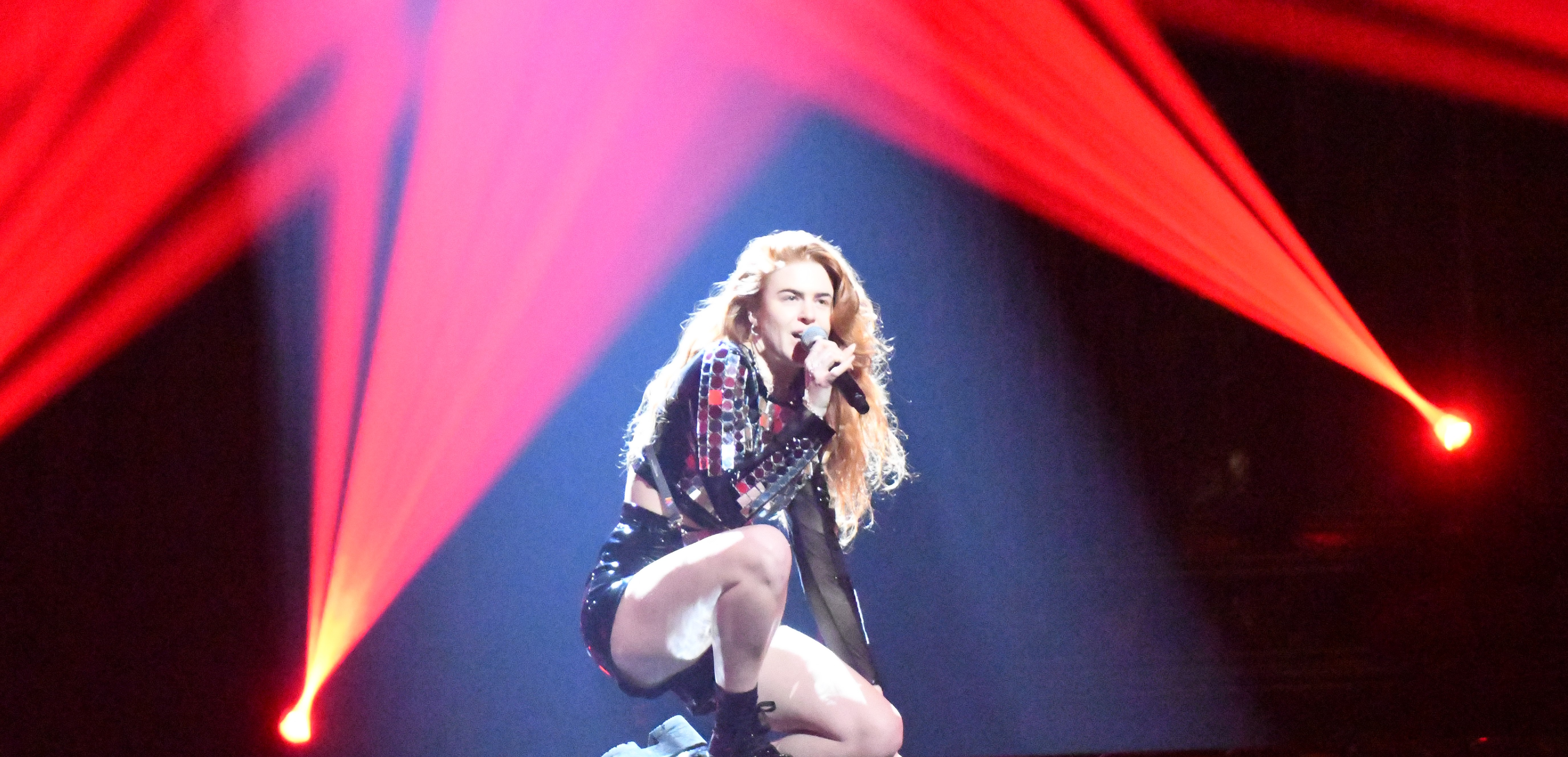 Melodifestivalen 2020, deltävling 2, Göteborg, Dotter